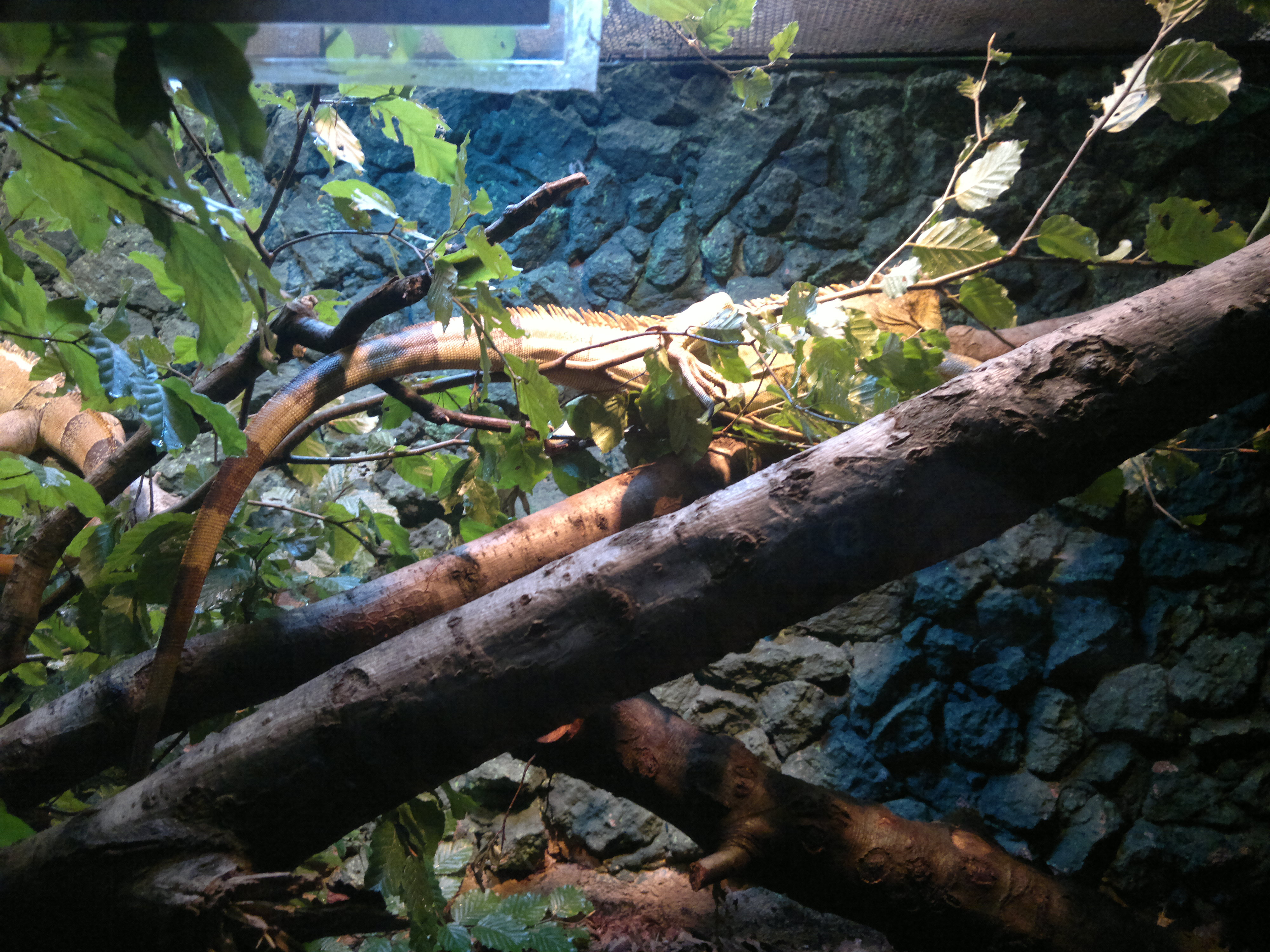 Lizard